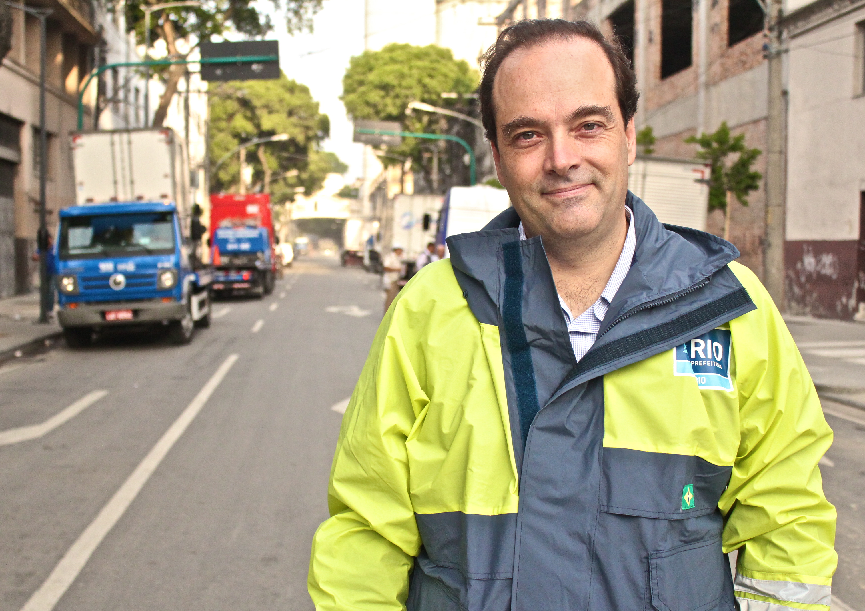 Carlos Roberto Osorio, em 2014, enquanto Secretario Municipal de Transportes do Rio de Janeiro